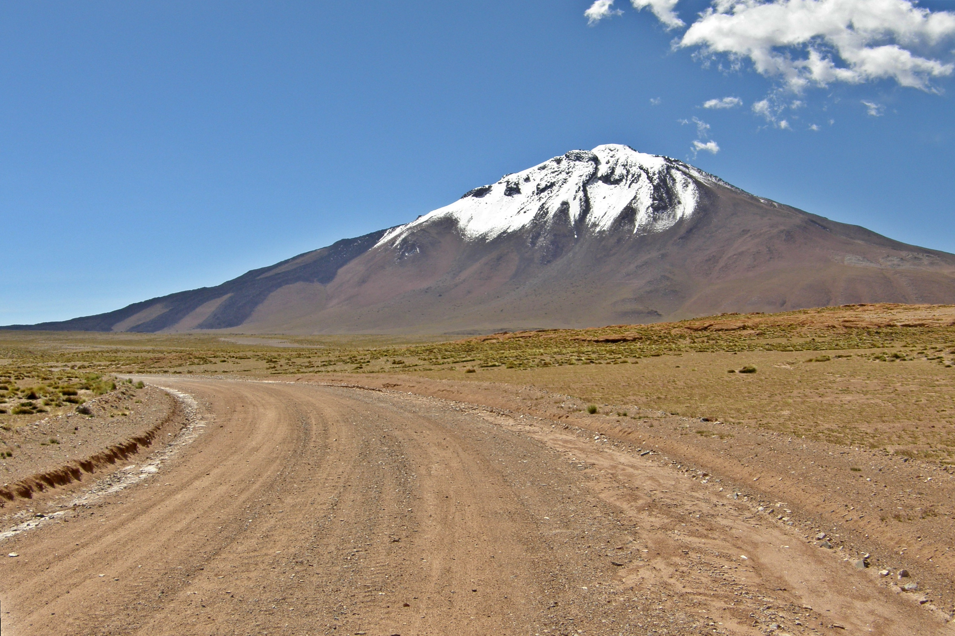 Tuzgle 5486m, face sud vue de la RN40 (nouveau tracé). Il se situ au sud du départamento de Susques, provincia de Jujuy, Argentina.